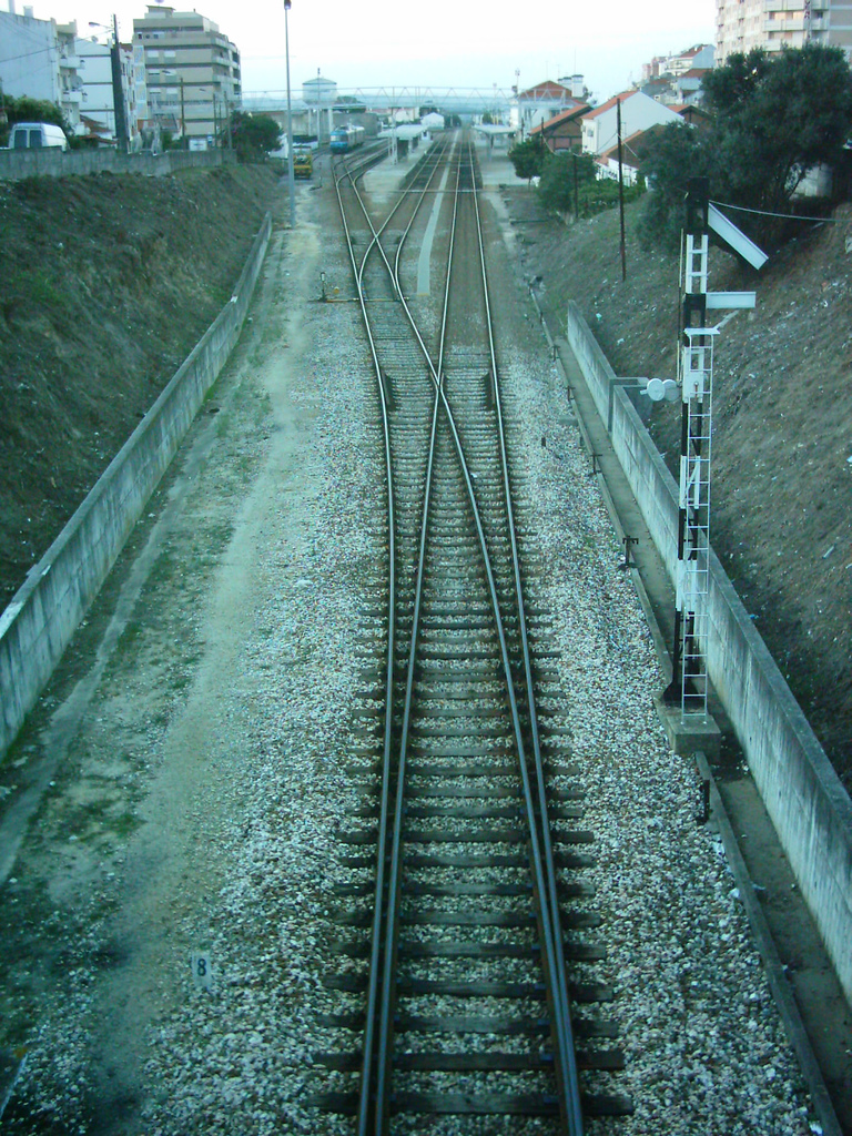 Caldas da Rainha: estação (panorâmica das vias)